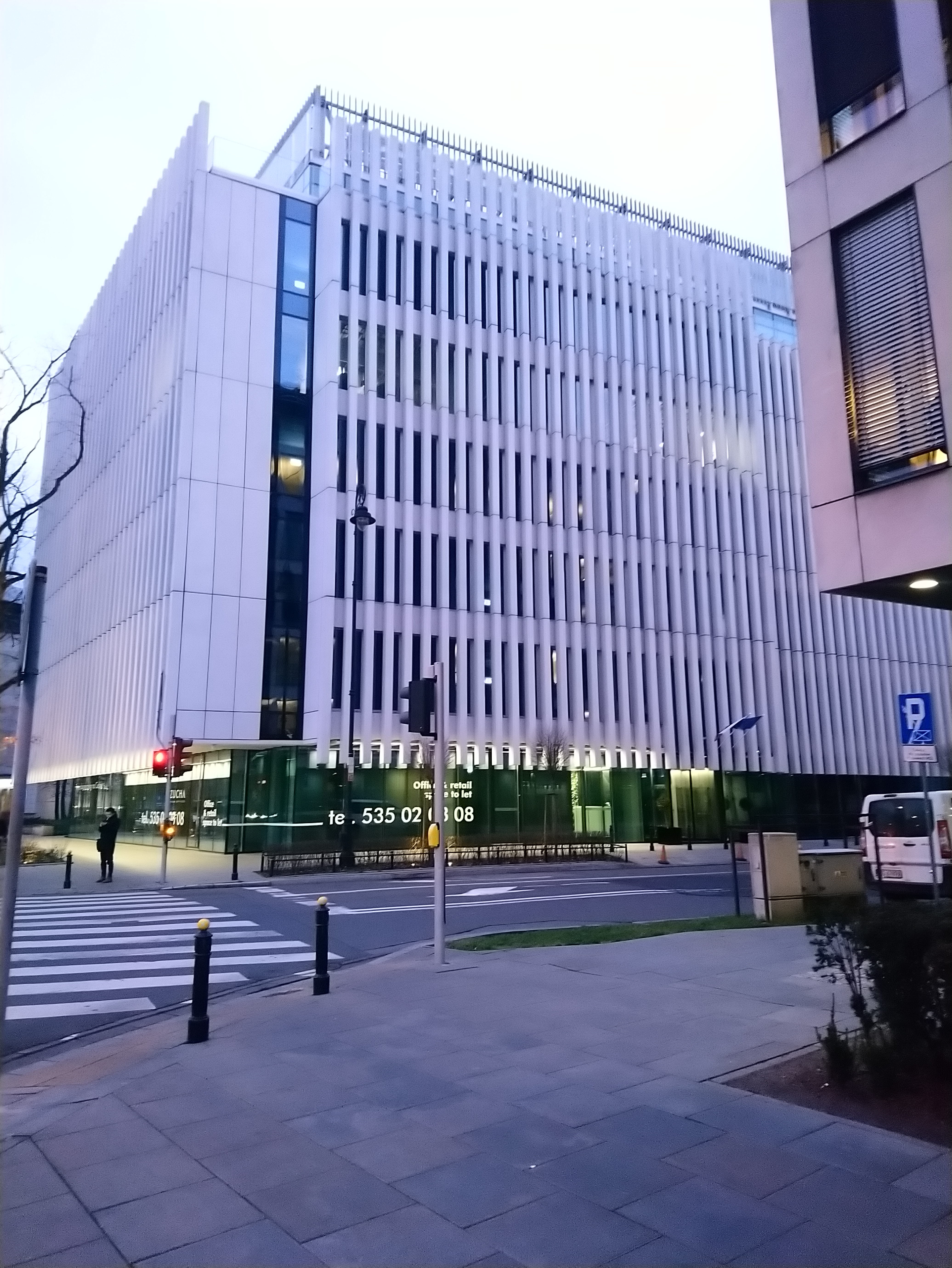 Budynek w którym znajduje się Ambasada Słowenii w Warszawie